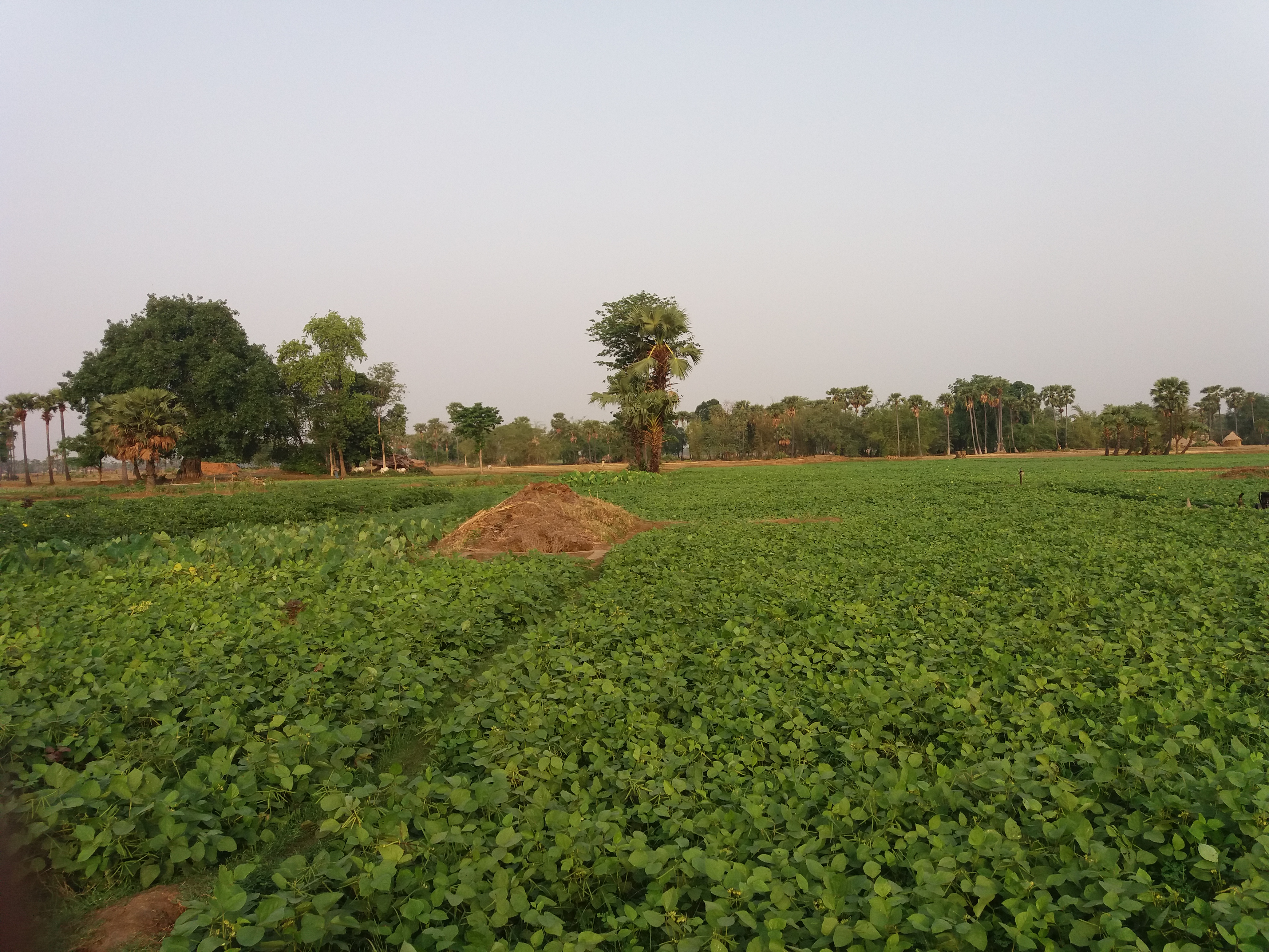 गांव में खेत